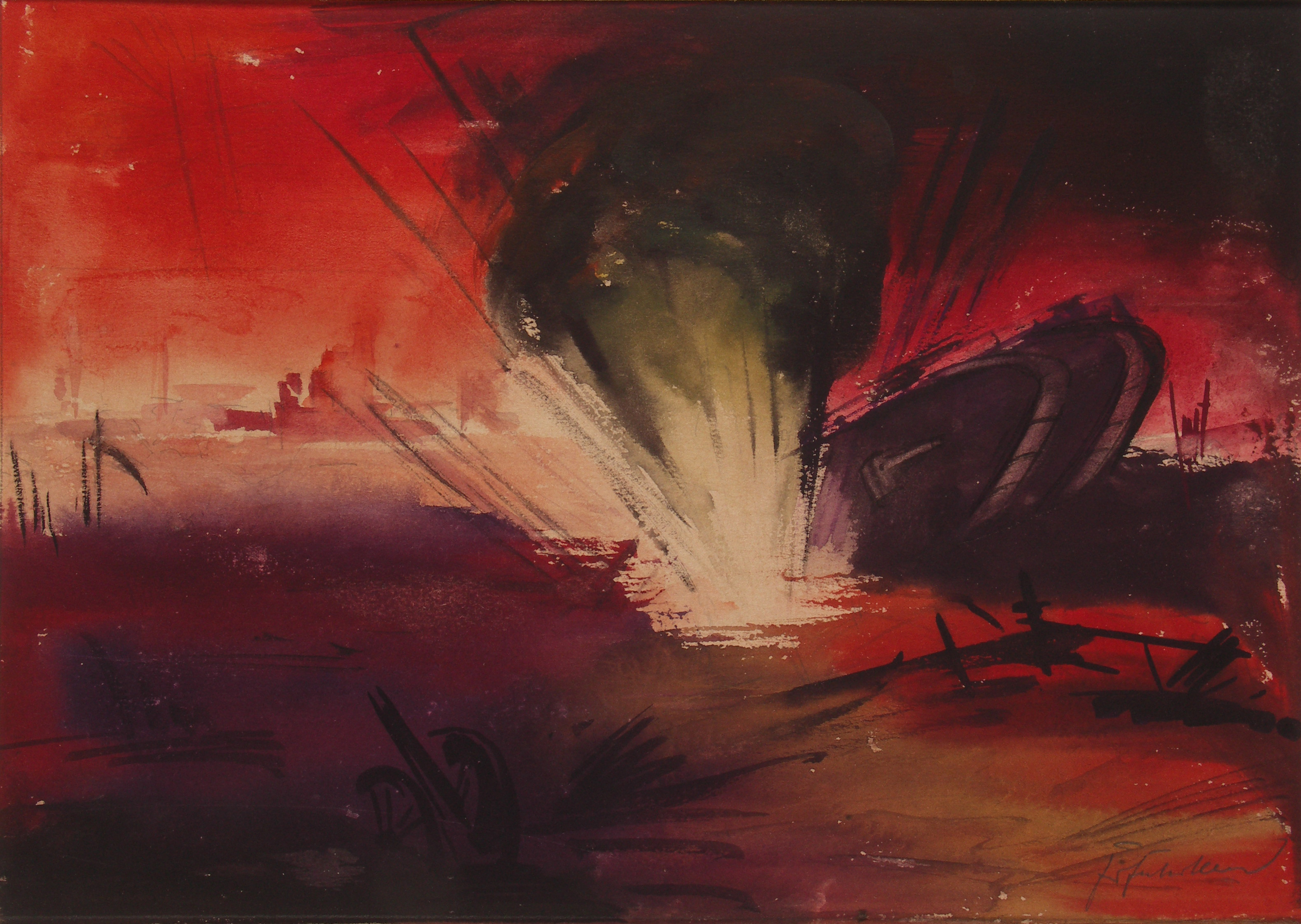 Granate trifft englischen Panzer in der Somme-Schlacht 1918––Gliderass (talk) 13:56, 3 February 2010 (UTC)